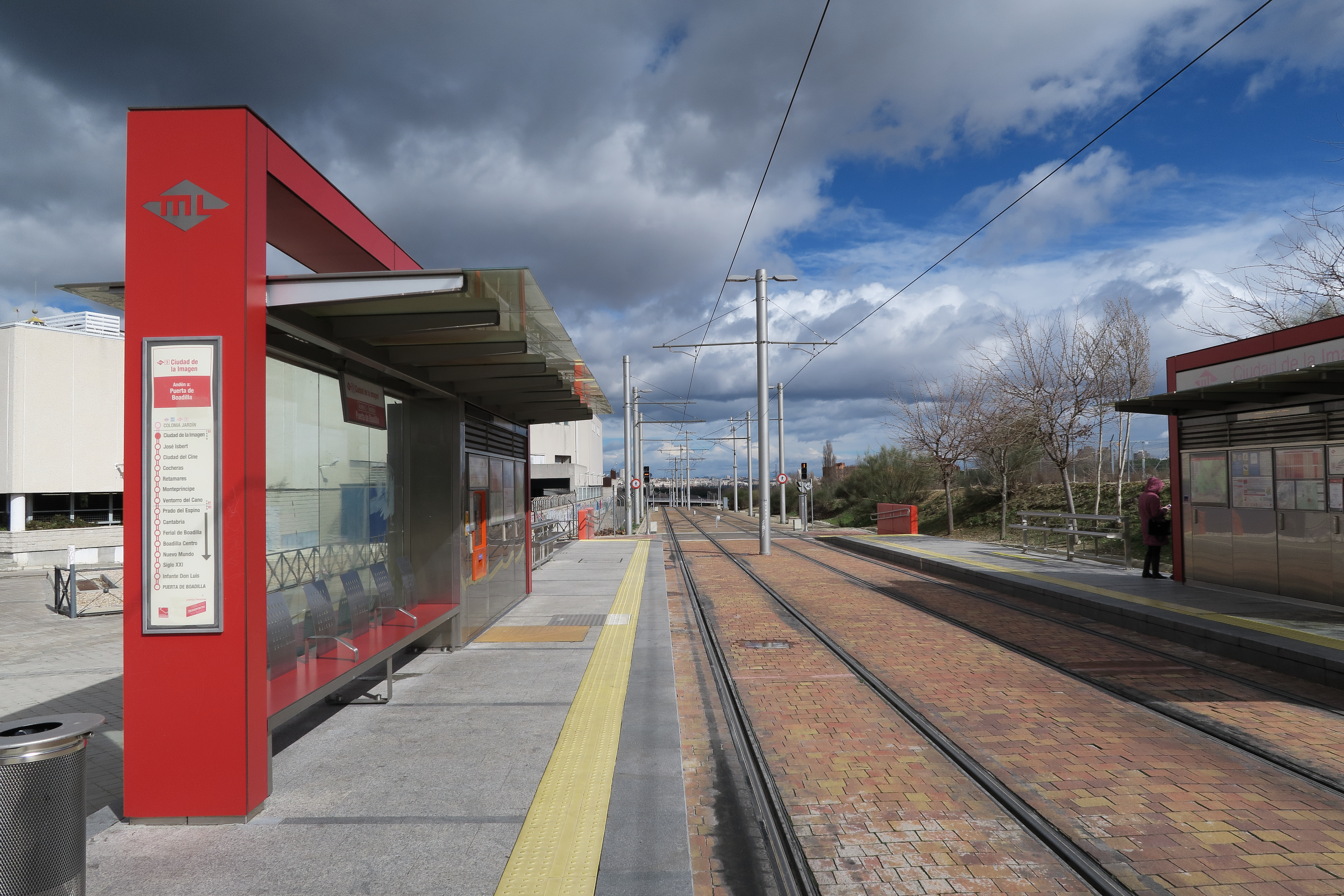 Estación de Ciudad de la Imagen